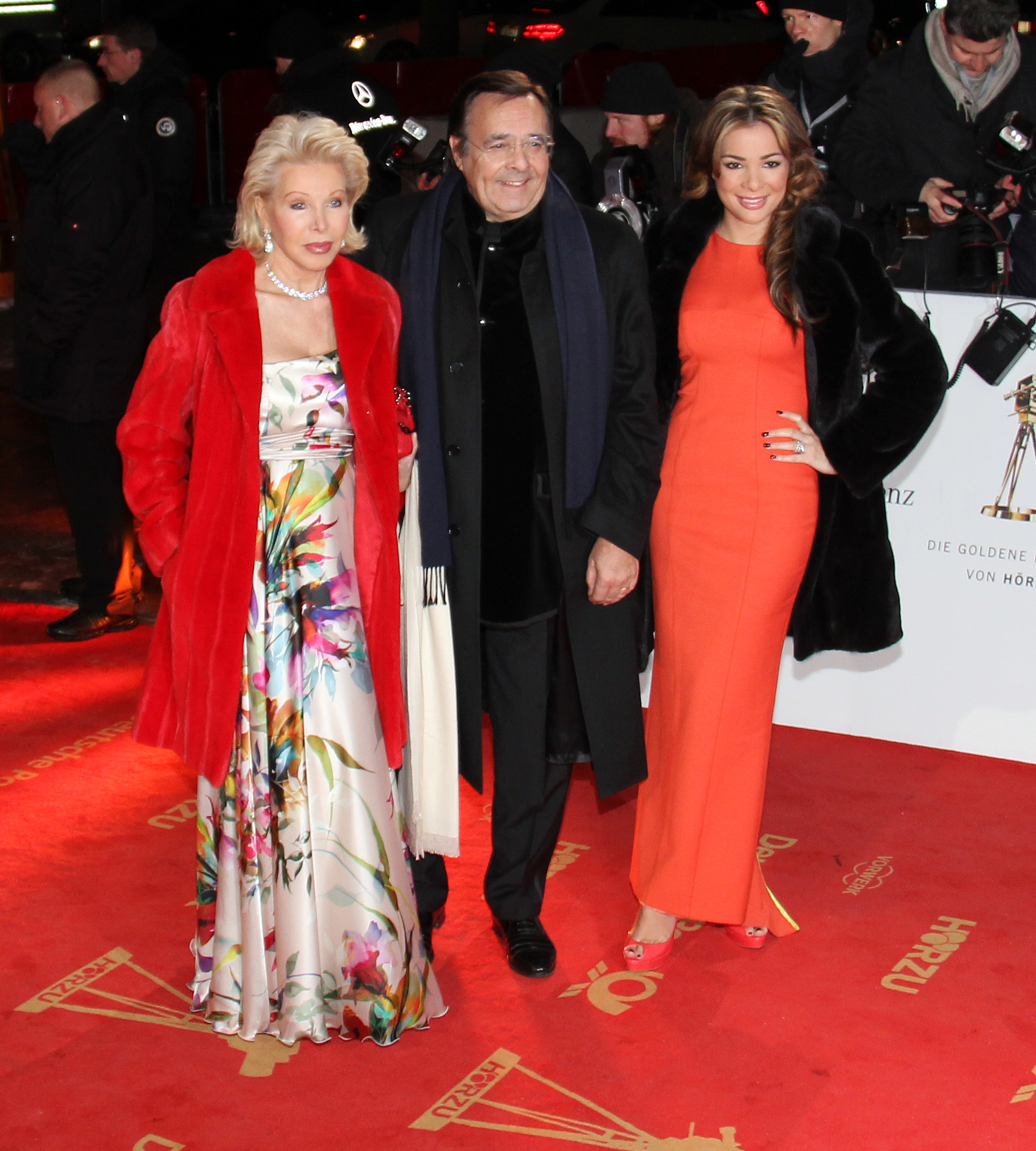 Ute-Henriette Ohoven, Mario Ohoven und Tochter Chiara bei der Goldenen Kamera 2012